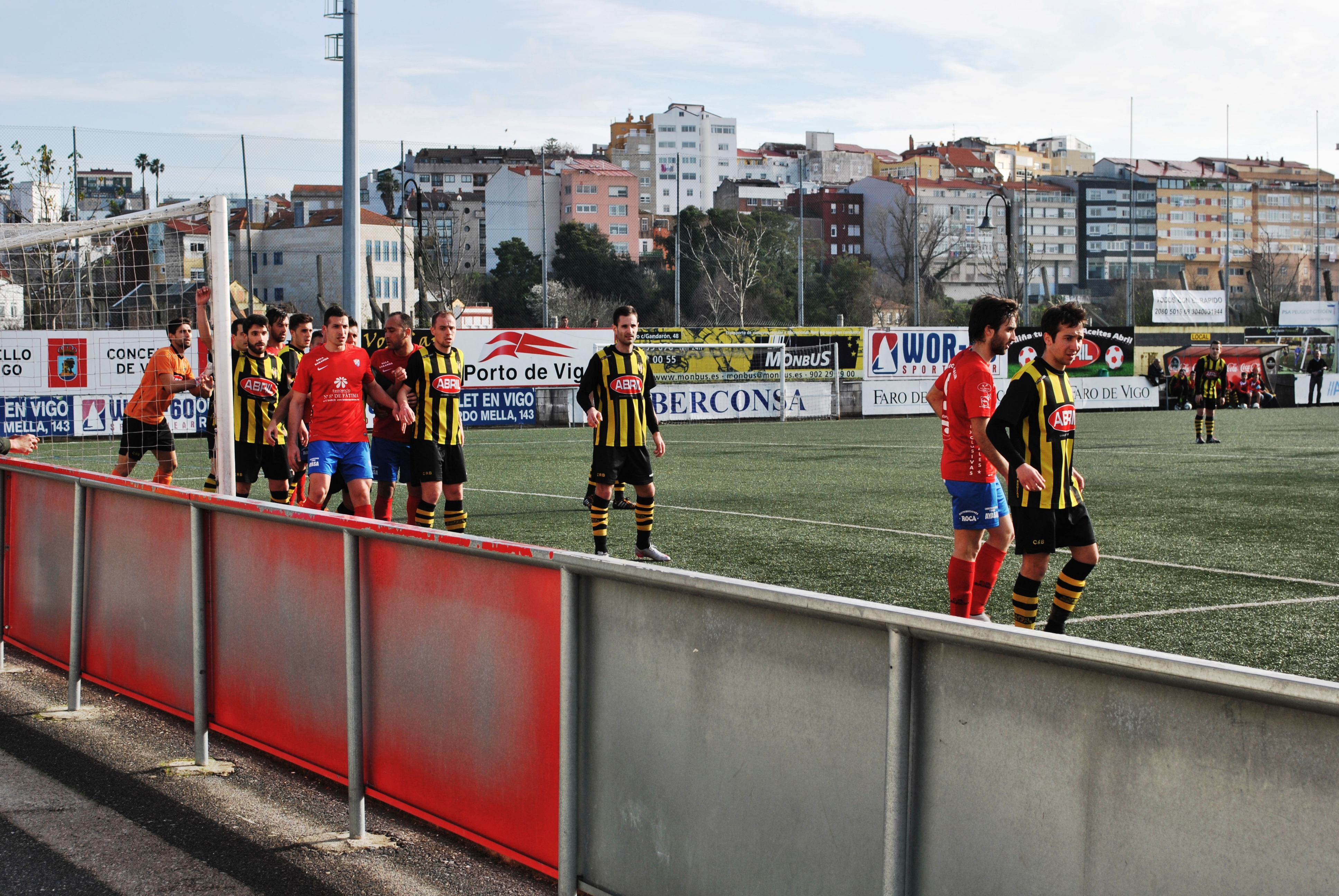 Véxase o título e as categorías.